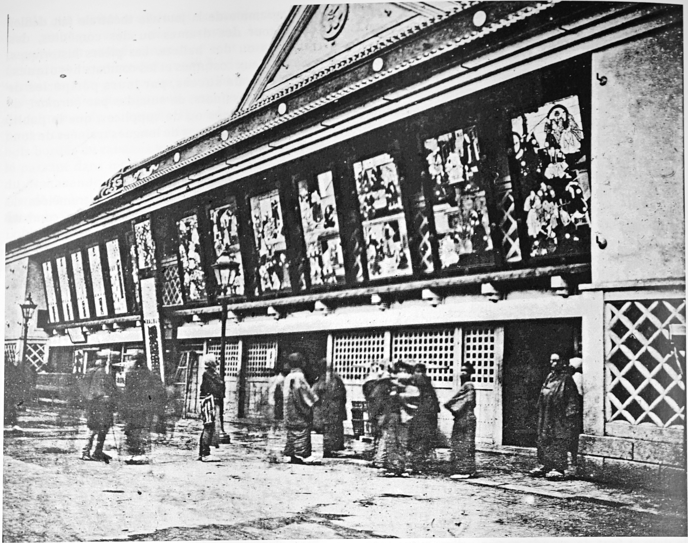 image utilisée par Krafft pour une conférence, elle est prise lors de son voyage ua Japon en 1883. Peut-être le Morita-za.